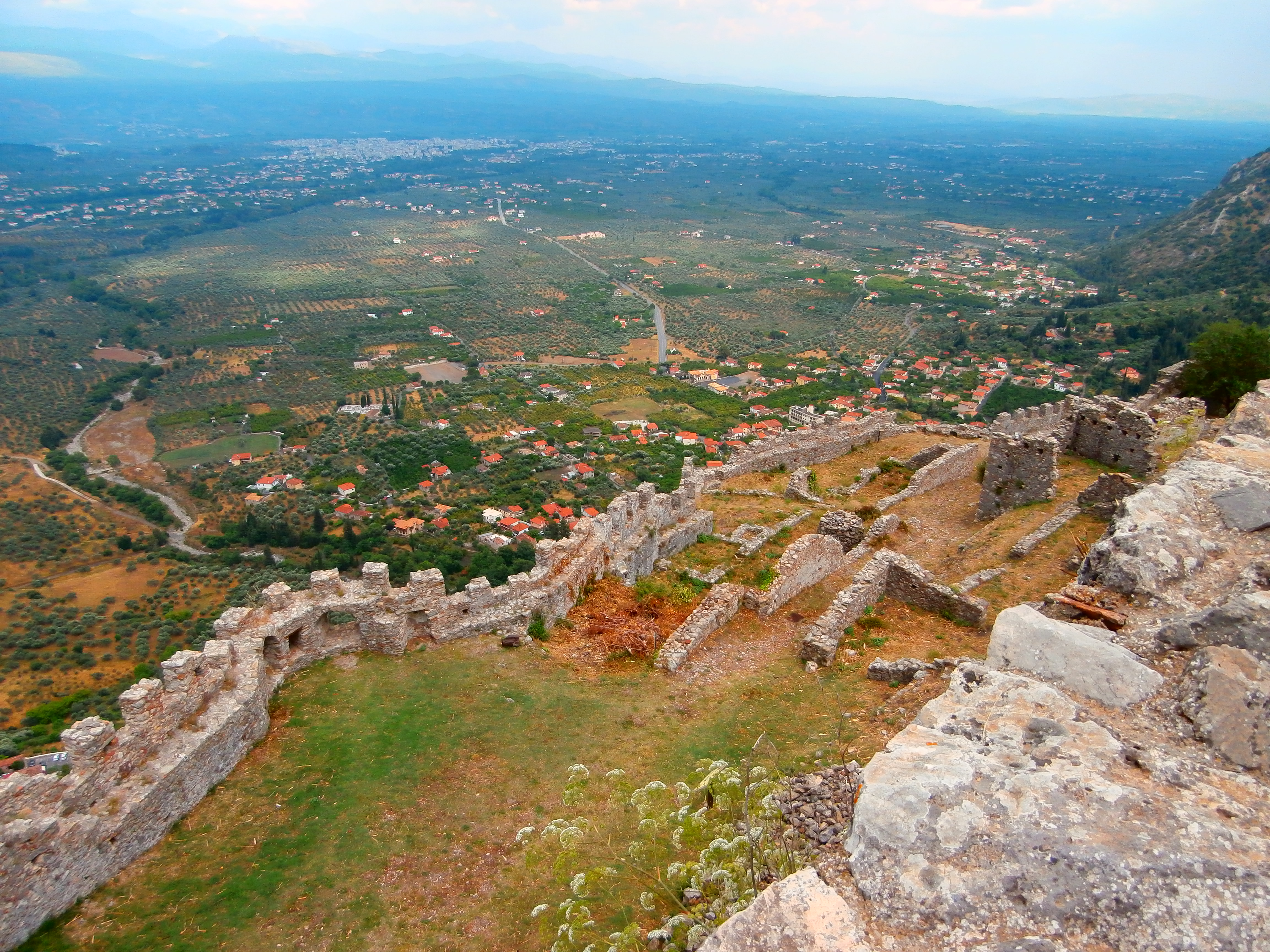 Η ακρόπολη και η οχύρωση της καστροπολιτείας του Μυστρά«Η ακρόπολη και η οχύρωση της καστροπολιτείας του Μυστρά»